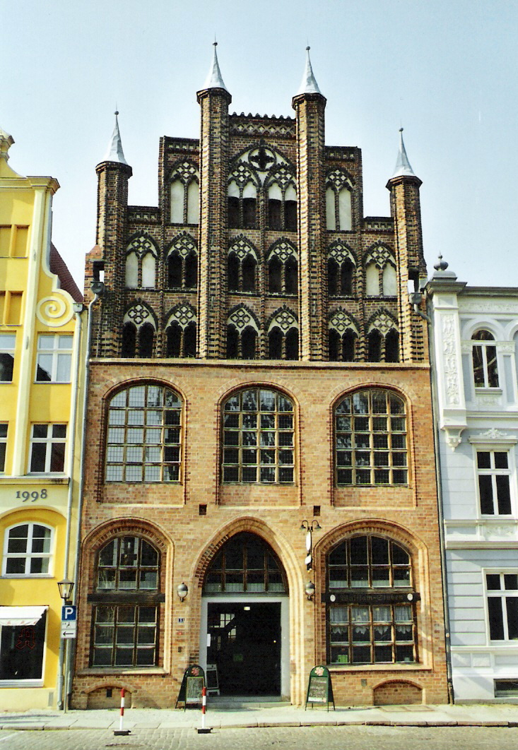 Foto zeigt das Wulflamhaus am Alten Markt in Stralsund. Fotografiert habe ich es im Mai 2006 mit meiner Canon EOS 300. Autor: Benutzer:Klugschnacker.